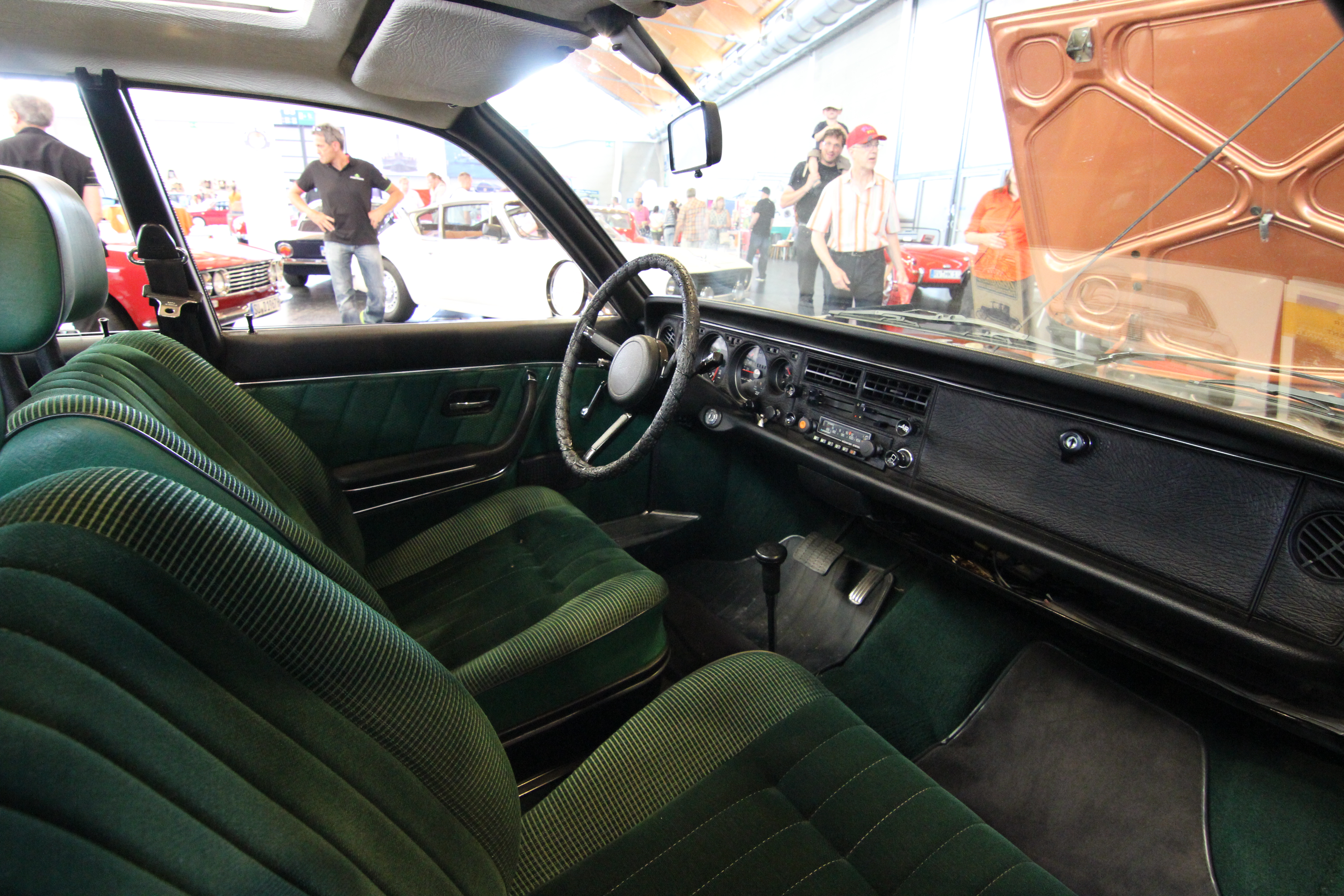 NSU Ro80 - auf der Klassikwelt Bodensee Friedrichshafen NSU Ro80 Innenraum - auf der Klassikwelt Bodensee Friedrichshafen